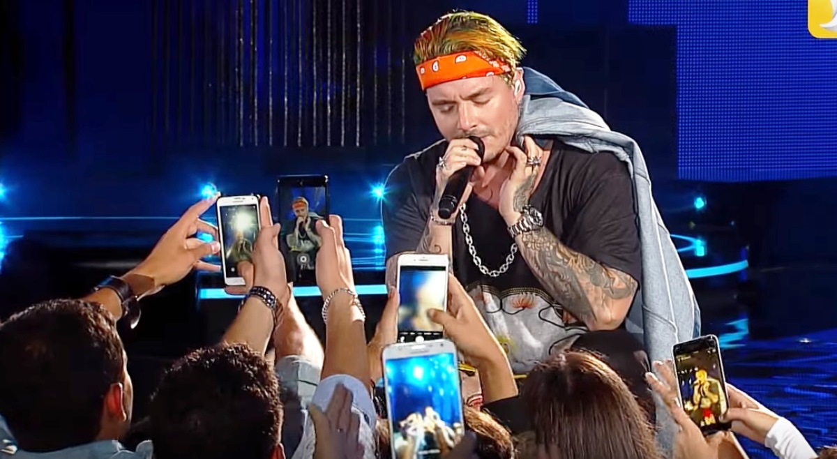 Directamente desde Medellín, Colombia, José Álvaro Osorio Balvin, conocido por su nombre artístico como J BALVIN, se presenta por primera ante el público chileno eligiendo al “monstruo” de la Quinta Vergara como primer jurado de su show, entregando una performance sobre el escenario que mantuvo encendida a las más de 15 mil personas que asistieron a esa noche de cierre del Festival de Viña 2017.